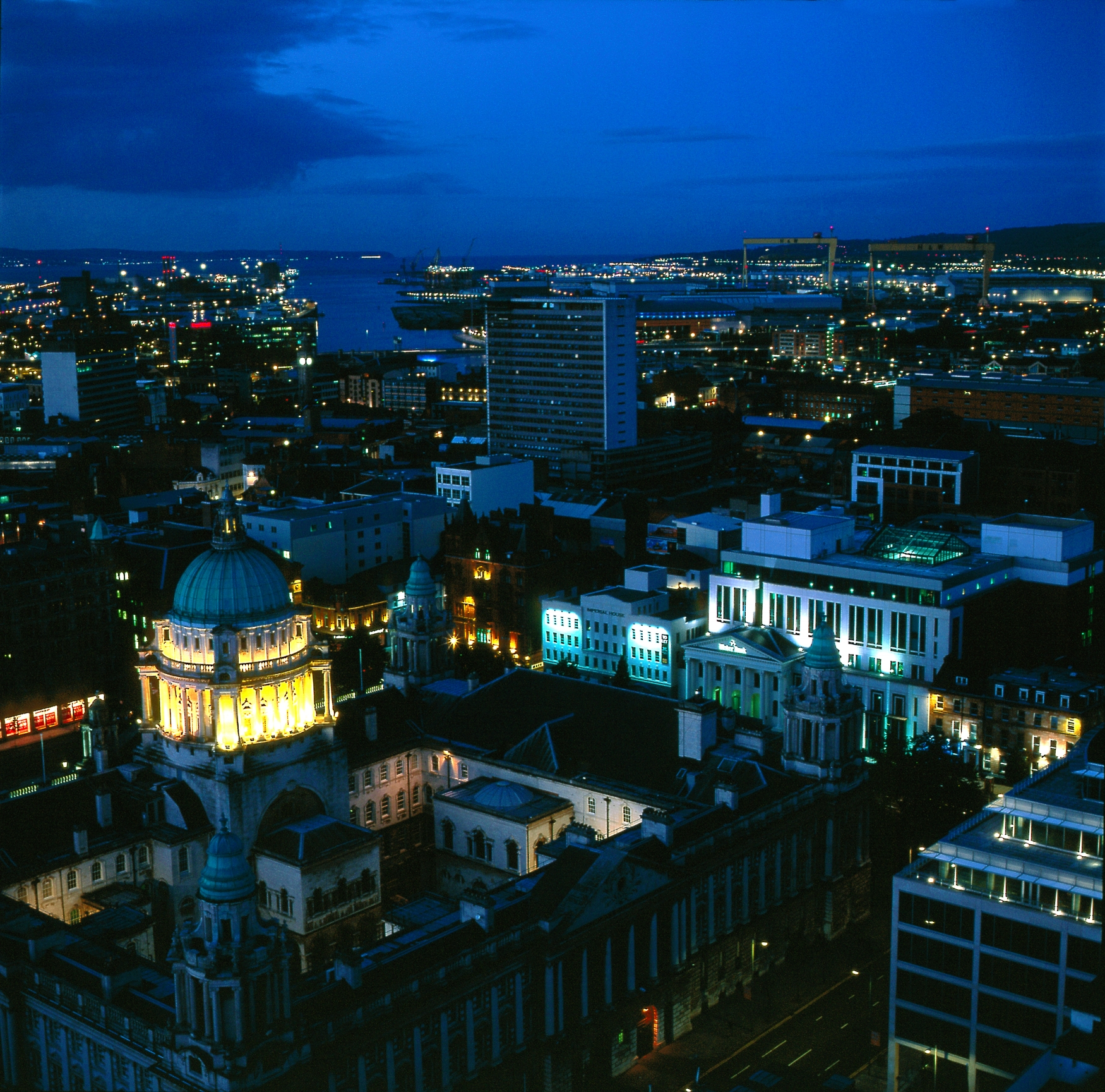 Belfast Skyline